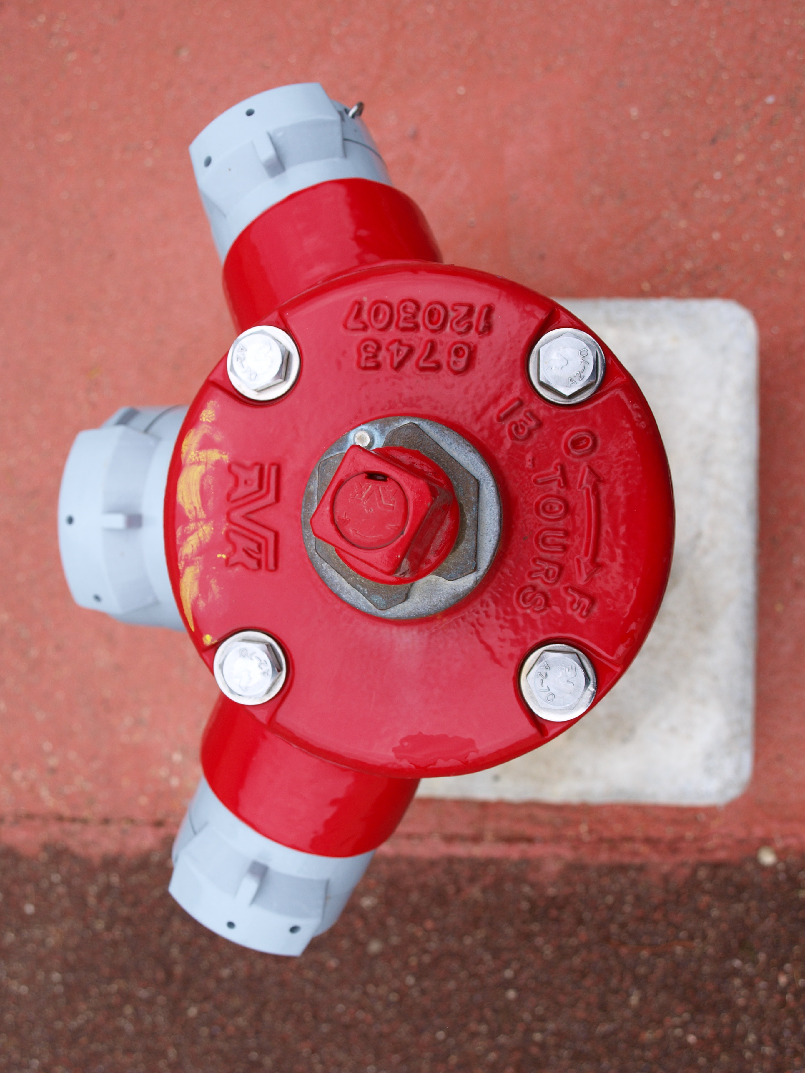 Meyrié (Isére, France)